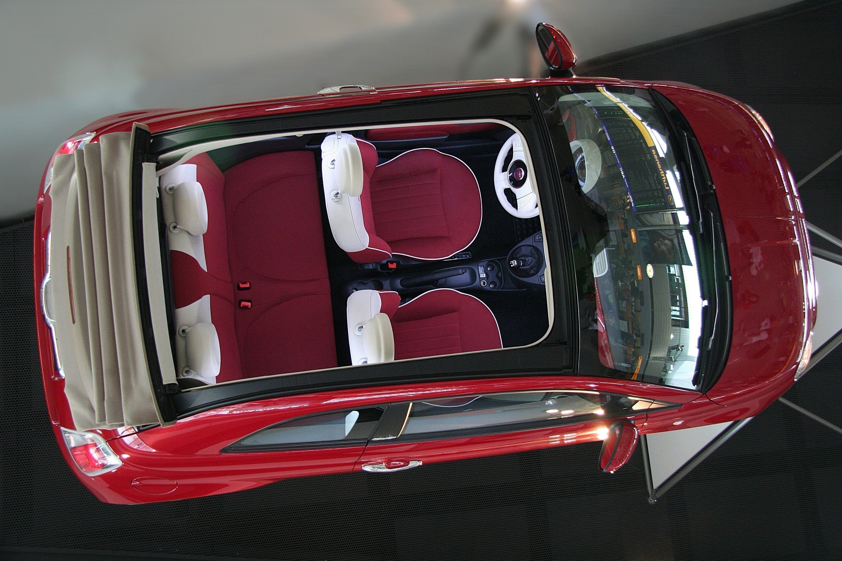 Fiat 500 C, Baujahr 2009.